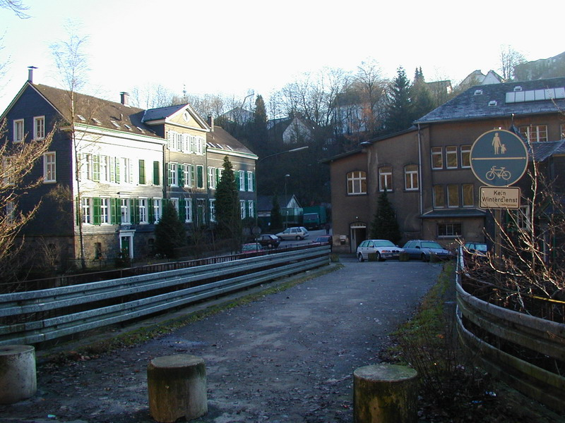 Die Wupperbrücke in Radevormwald-Vogelsmühle